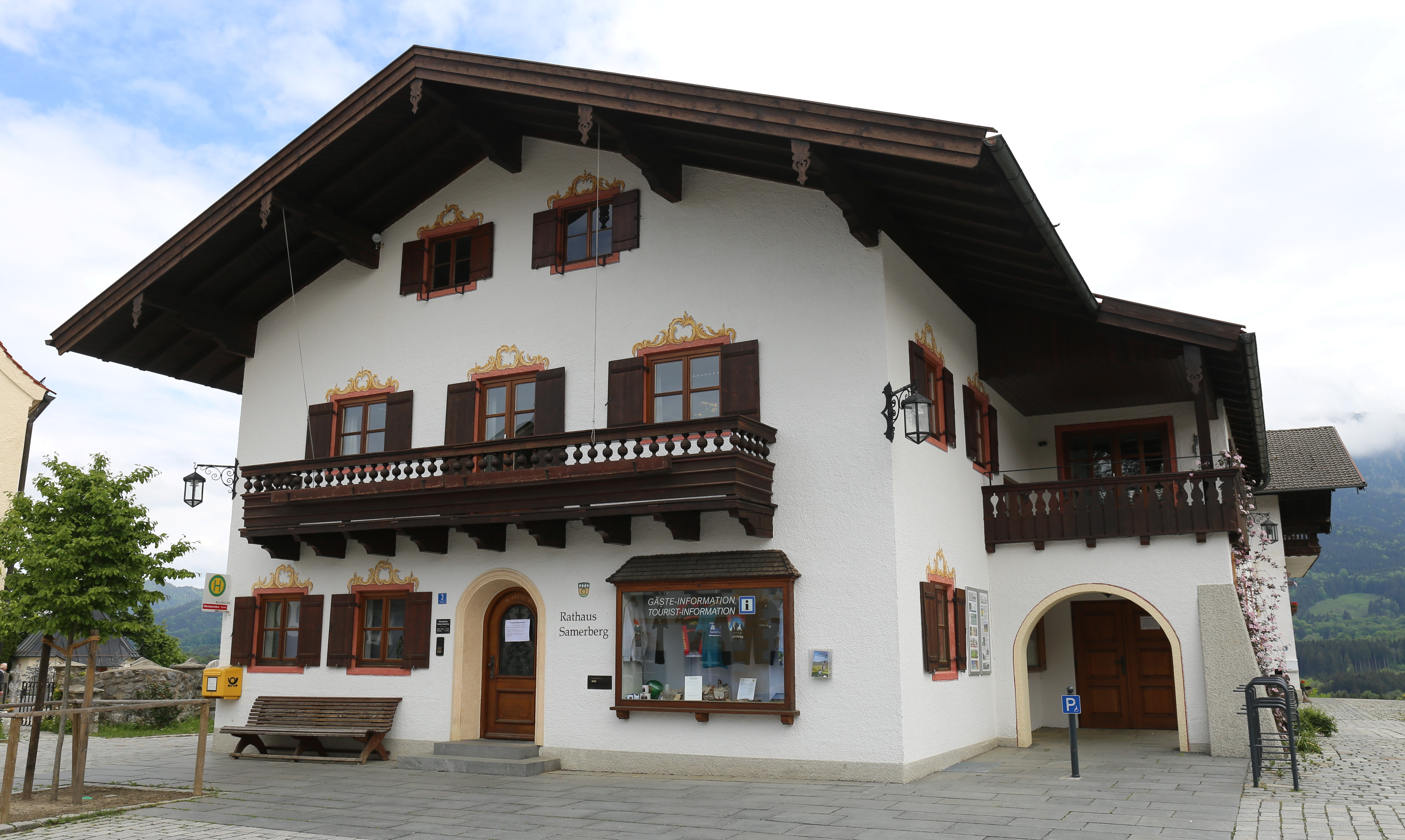 Dorfplatz 3, Törwang, Samerberg; Rathaus